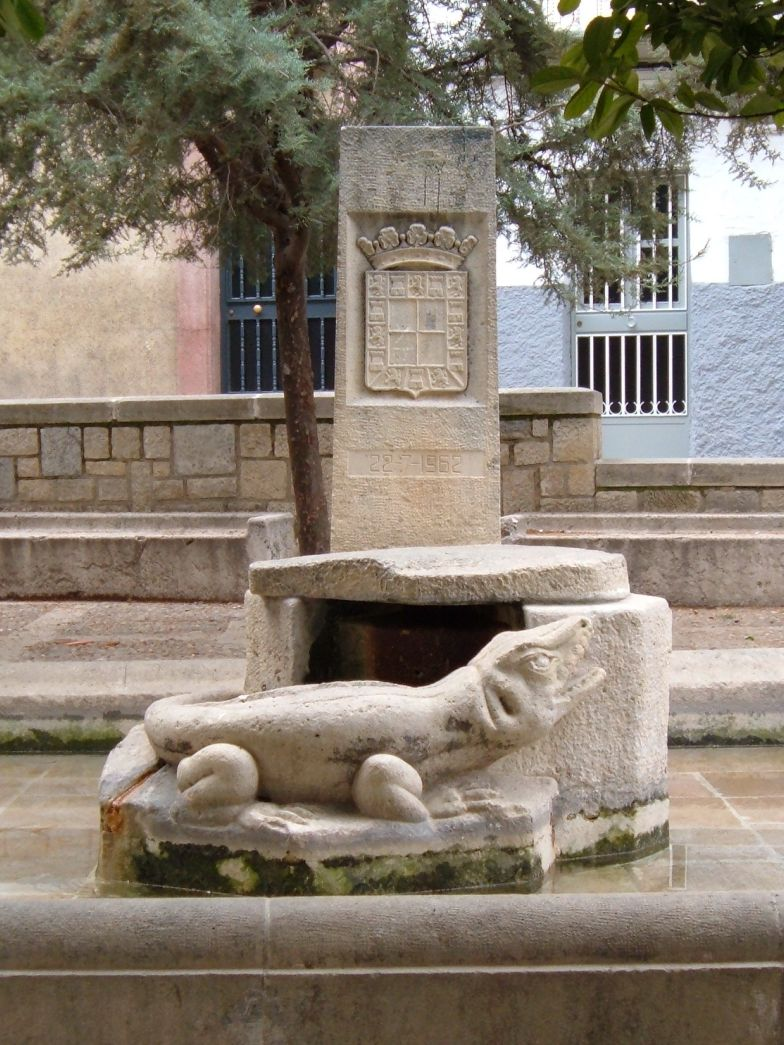 Fotografía del monumento del Lagarto de la Magdalena (Jaén).